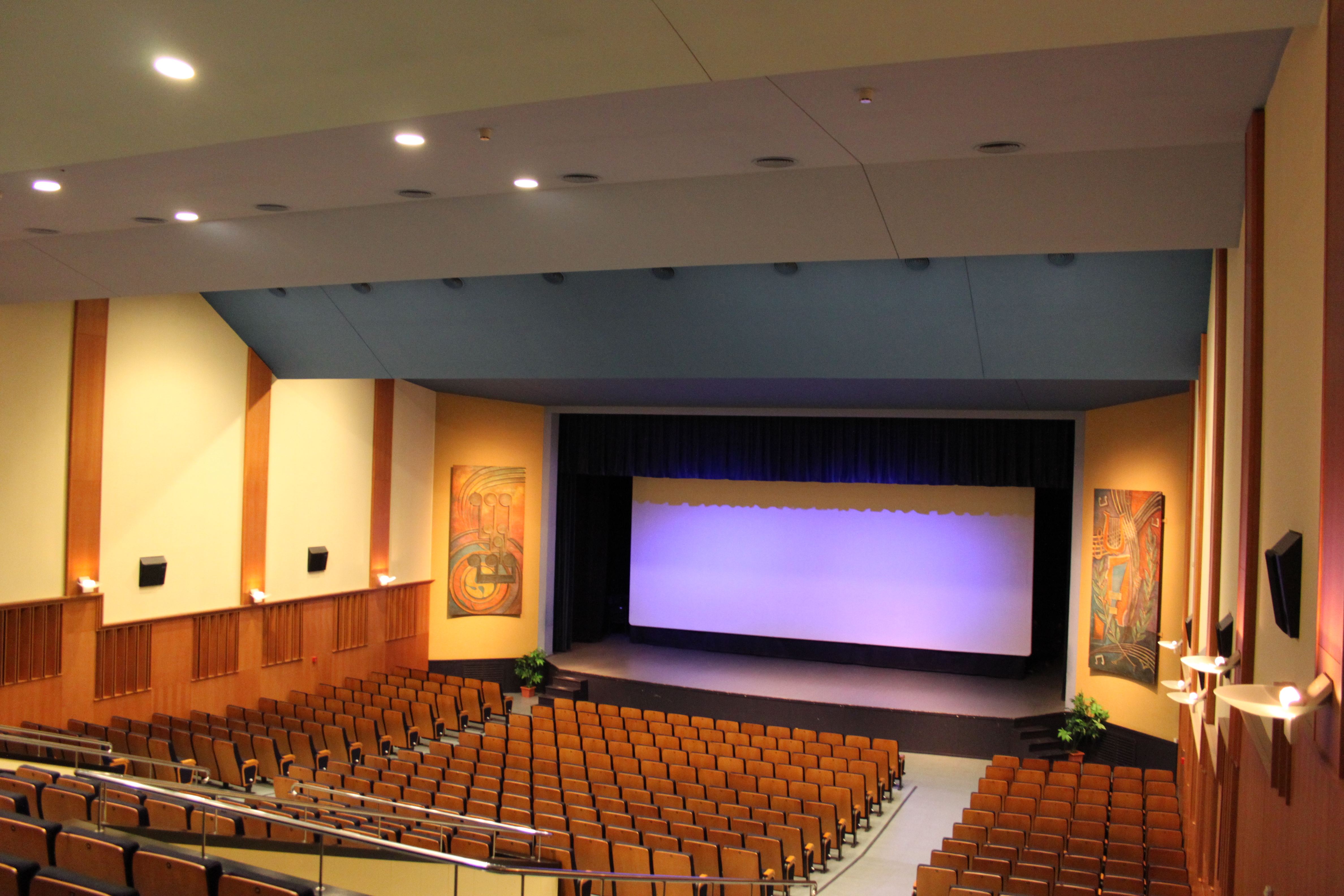 Instal·lacions La Lira Ampostina